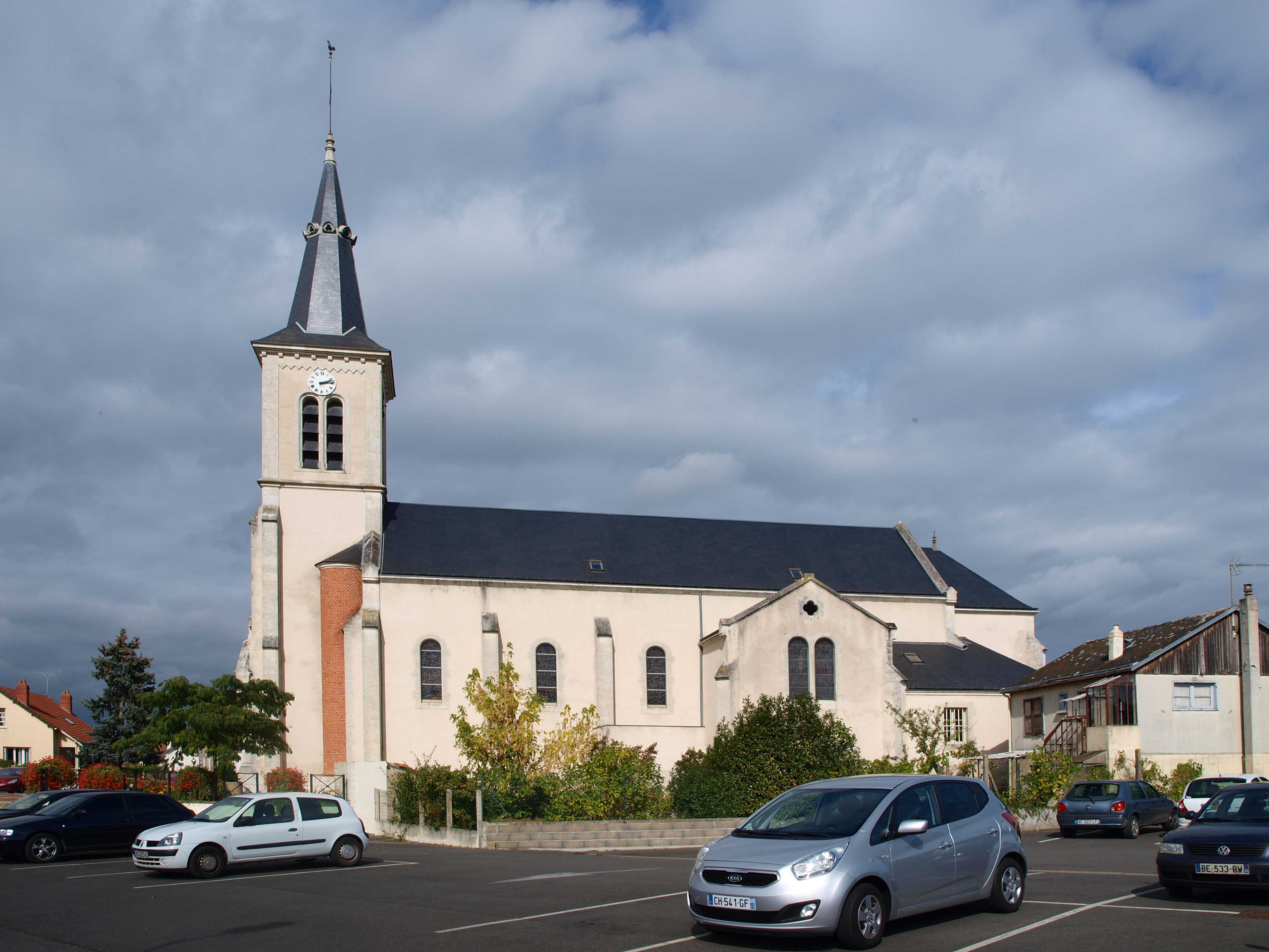 Villemandeur (Loiret) - église